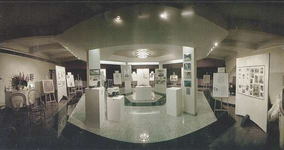 Exposição "Imagens de Um Pioneiro".